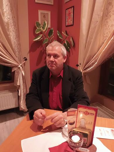 Niczky Géza, író-olvasó találkozón, Sátoraljaújhelyen